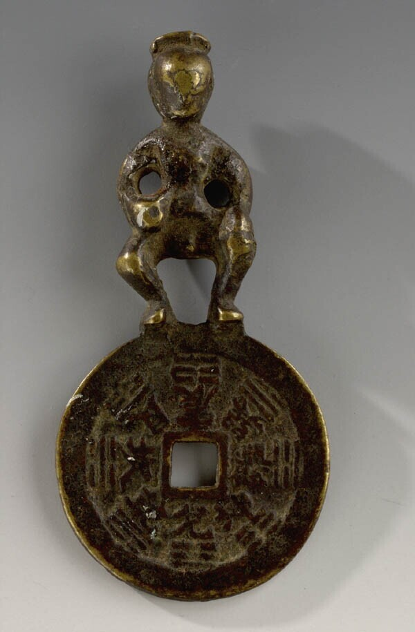 Amulet in de vorm van een munt, rond met een vierkant gat. Bovenop de munt een naakte hurkende man. Op de voorzijde staan de 8 trigrammen, op de achterzijde een magische formule.